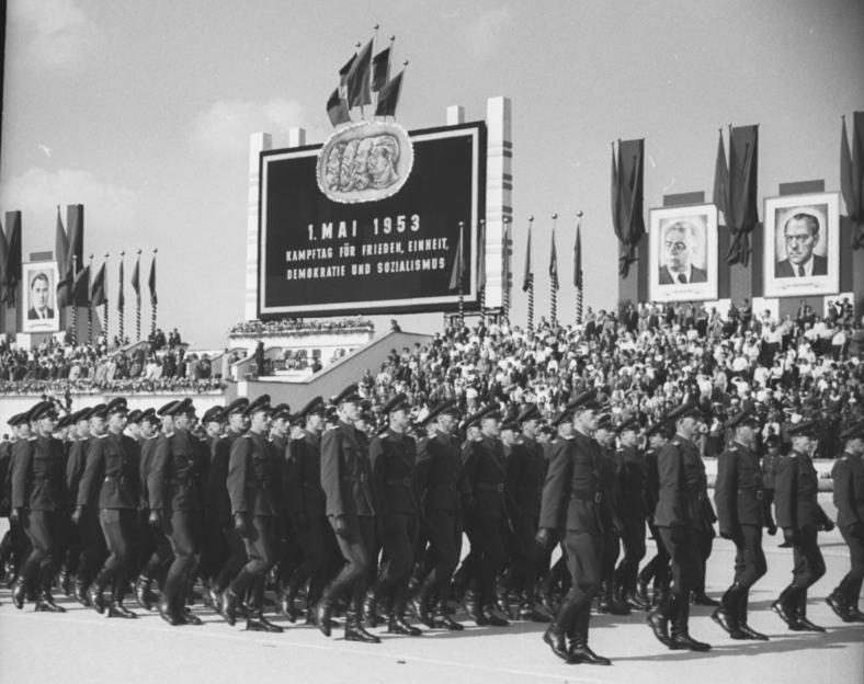 ADN-Zentralbild/Krueger 1.Mai 1953 - Kampftag der Werktätigen für Frieden, Einheit, Demokratie und Sozialismus Demonstration auf dem Marx-Engels-Platz in Berlin. UBz: Kasernierte Volkspolizei demonstriert an der Ehrentribüne vorbei.